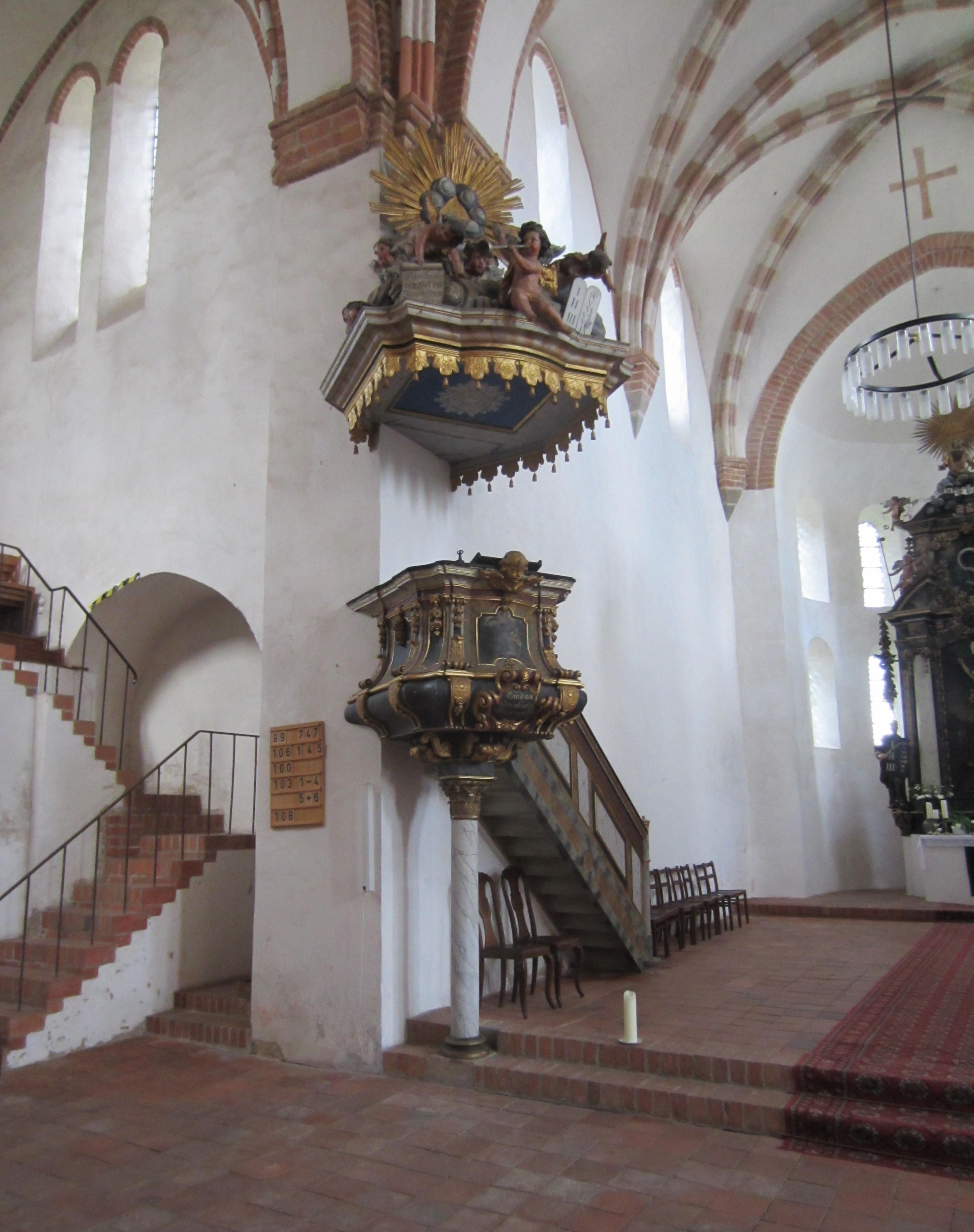 Stadtkirche St. Marien in Treuenbrietzen, barocke Kanzel